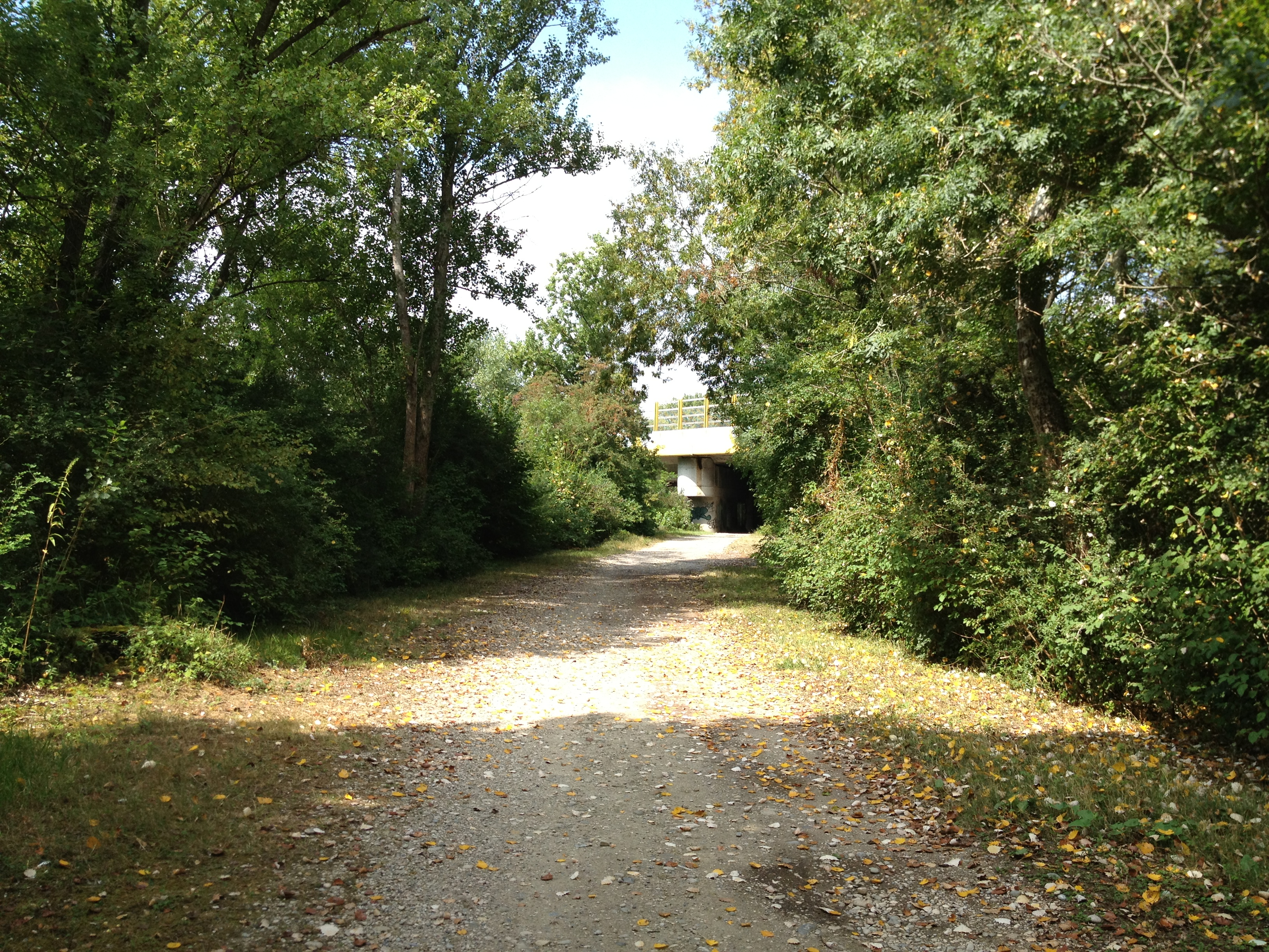 Pont de l'A42 à Saint-Maurice-de-Beynost depuis le chemin de halage.